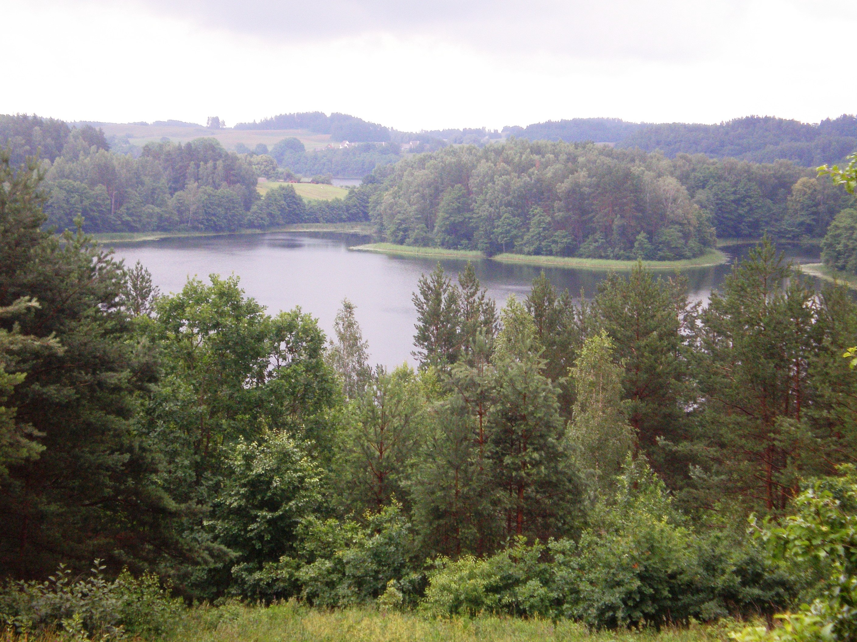 Alksnaitis lake from Ladakalnis hill